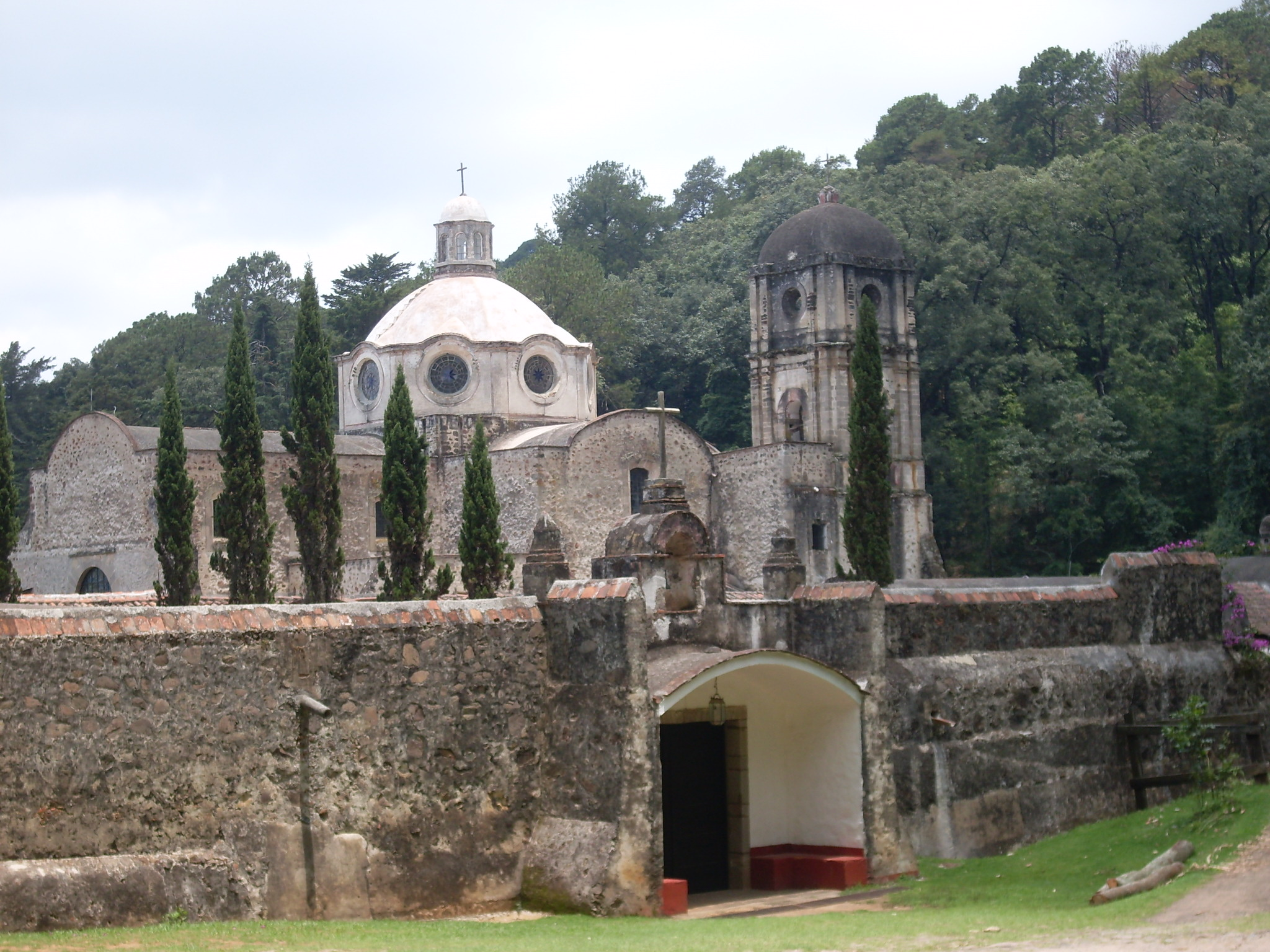 Convento de Carmelitas descalzos